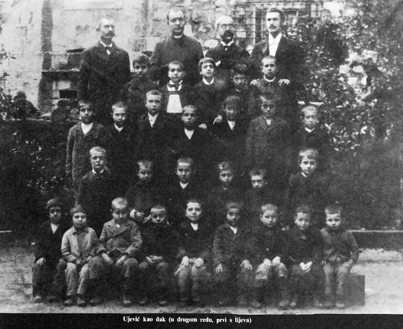 Hrvatski pjesnik Tin Ujević, slika iz razreda. (Croatian poet Tin Ujević, photo from class.)